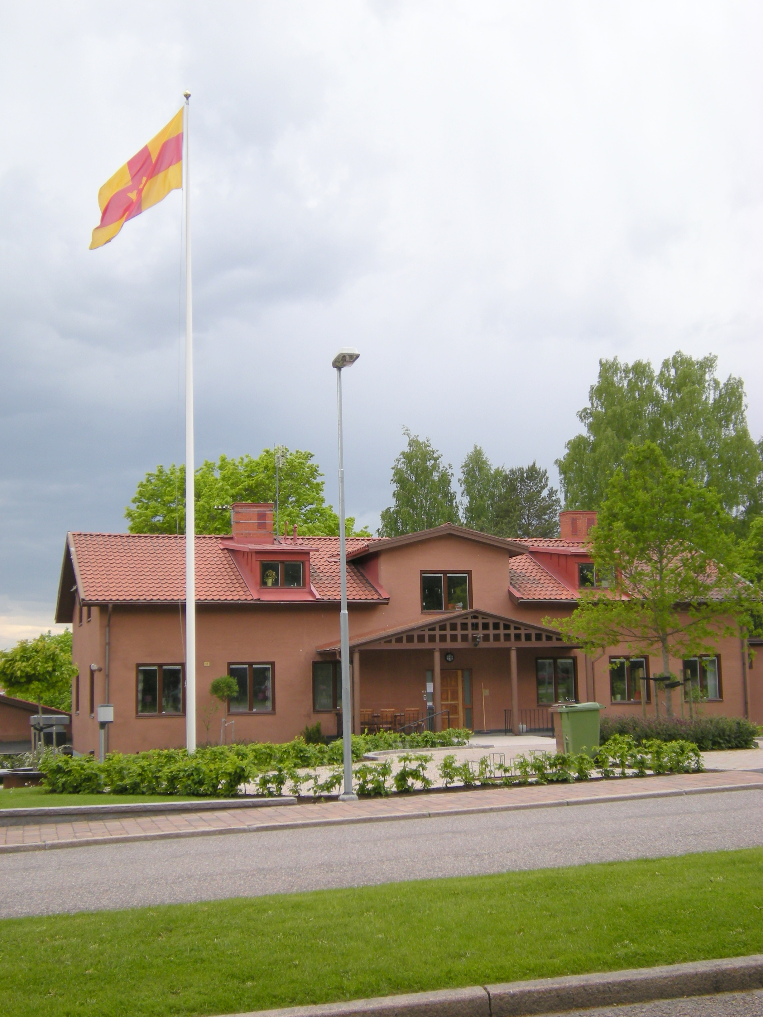 Sandvikens församlings pastorsexpedition. Bergslagssafari 2010.